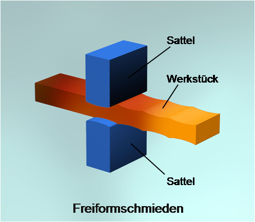 Grafik Freiformschmieden